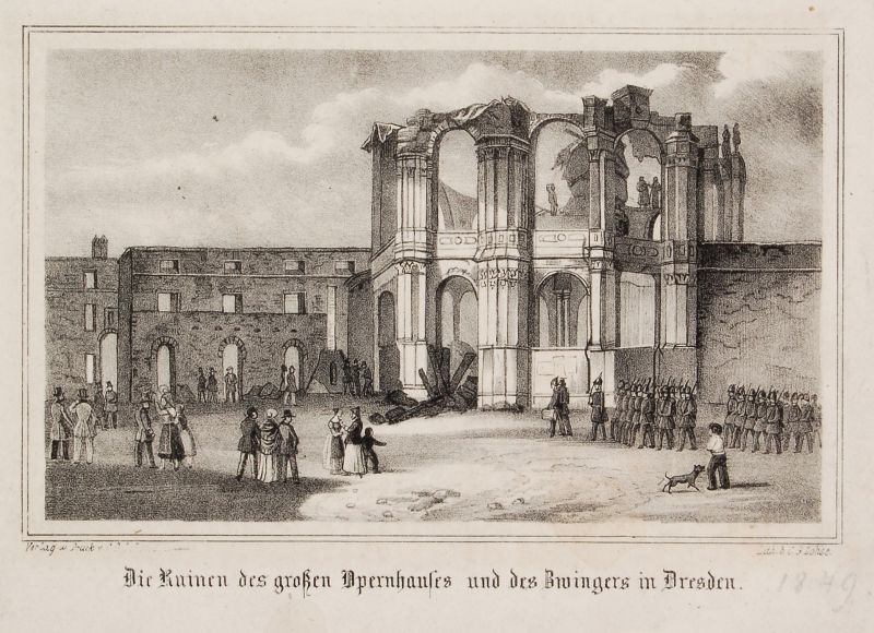 Die Ruinen des großen Opernhauses und des Zwingers in Dresden